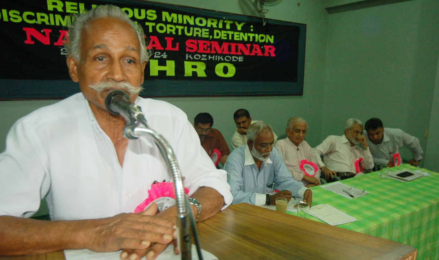 വാസുവേട്ടൻ